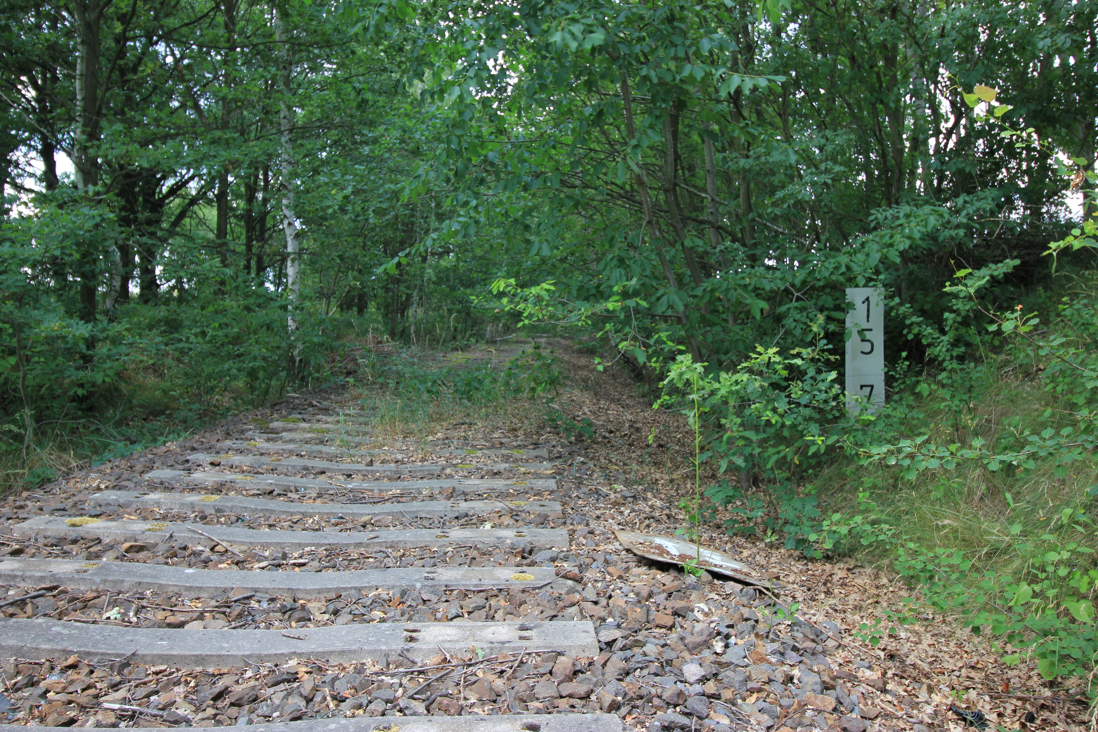 Hornjoserbsce: Stara železniska čara pola Njeswačidła.